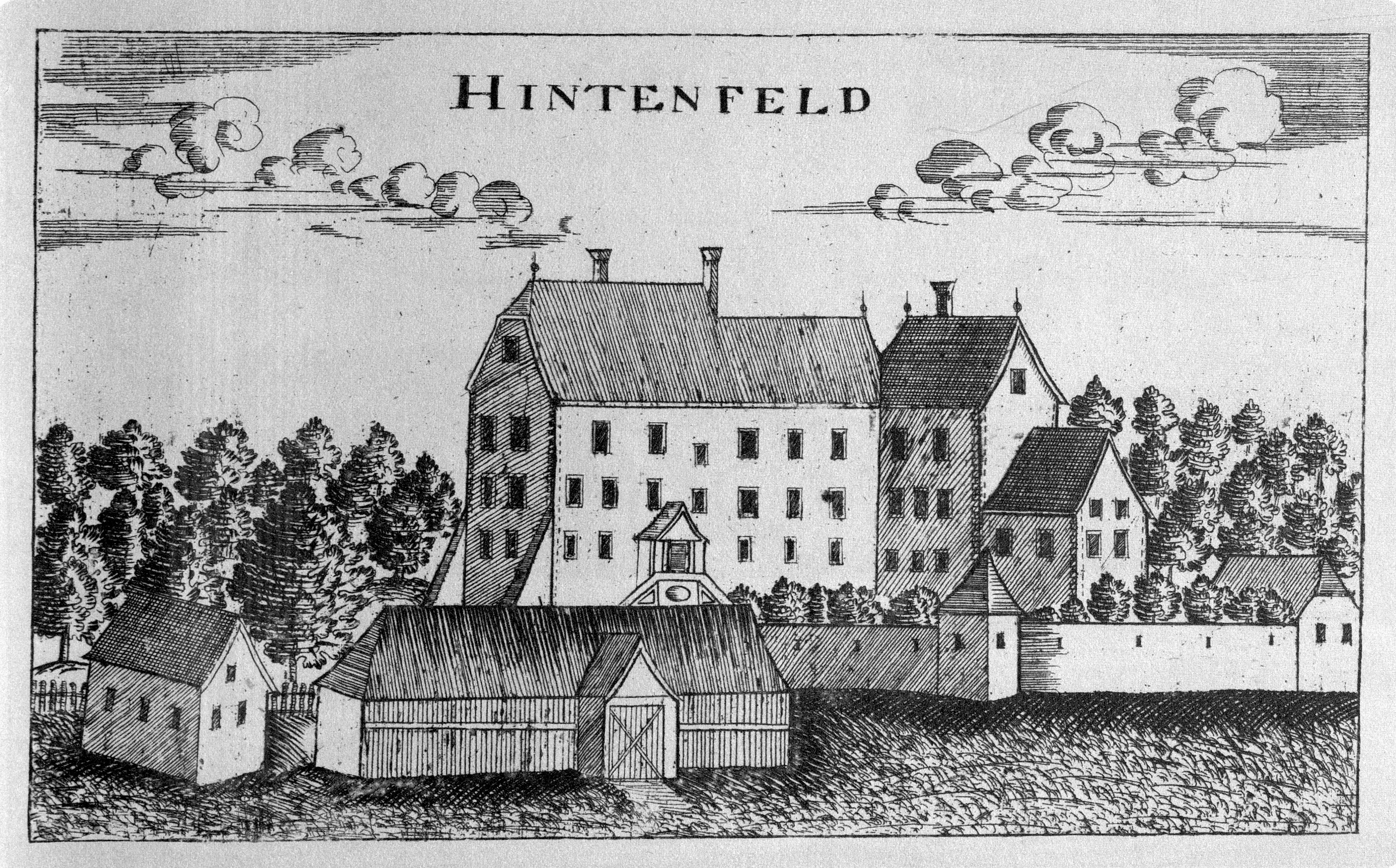 G. M. Vischers Käyserlichen Geographi, Topographia Ducatus Stiriae, Das ist: Eigentliche Delineation / und Abbildung aller Städte / Schlösser / Marcktfleck / Lustgärten / Probsteyen / Stiffter / Clöster und Kirchen / so es sich im Herzogthumb Steyrmarck befinden; Und anjetzo Umb einen billichen Preyß zu finden seynd Bey Johann Bitsch Universitäts Buchhandlern / Auff dem Juden=Platz bey der guldenen Saulen. Graz 1681 Die Nummerierung der Dateien folgt der alphabetischen Reihung der Ortsnamen